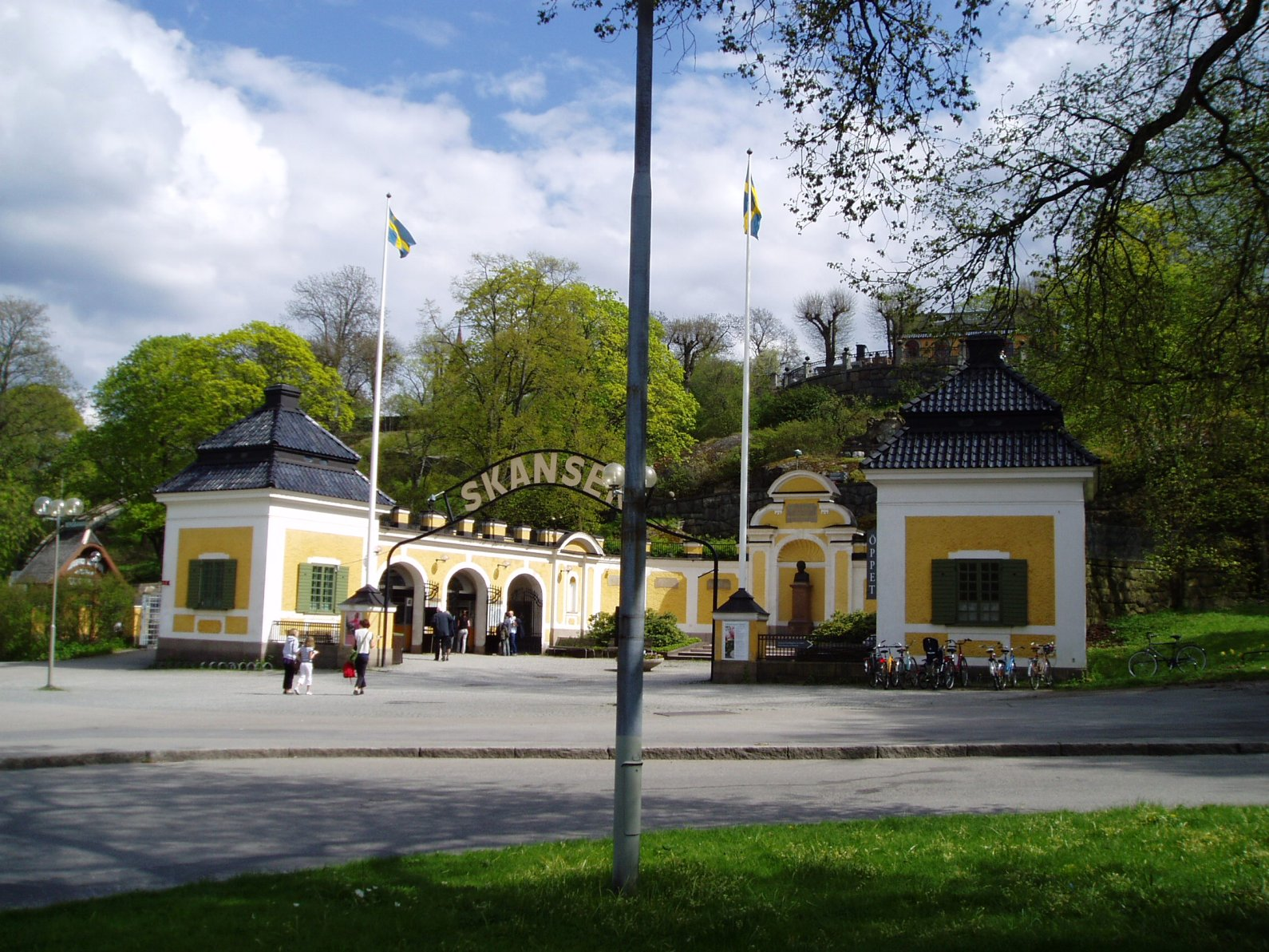 Hazeliusporten, Skansen, Stockholm